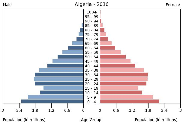 A population pyramid illustrates the age and sex structure of a country's population and may provide insights about political and social stability, as well as economic development. The population is distributed along the horizontal axis, with males shown on the left and females on the right. The male and female populations are broken down into 5-year age groups represented as horizontal bars along the vertical axis, with the youngest age groups at the bottom and the oldest at the top. The shape of the population pyramid gradually evolves over time based on fertility, mortality, and international migration trends.